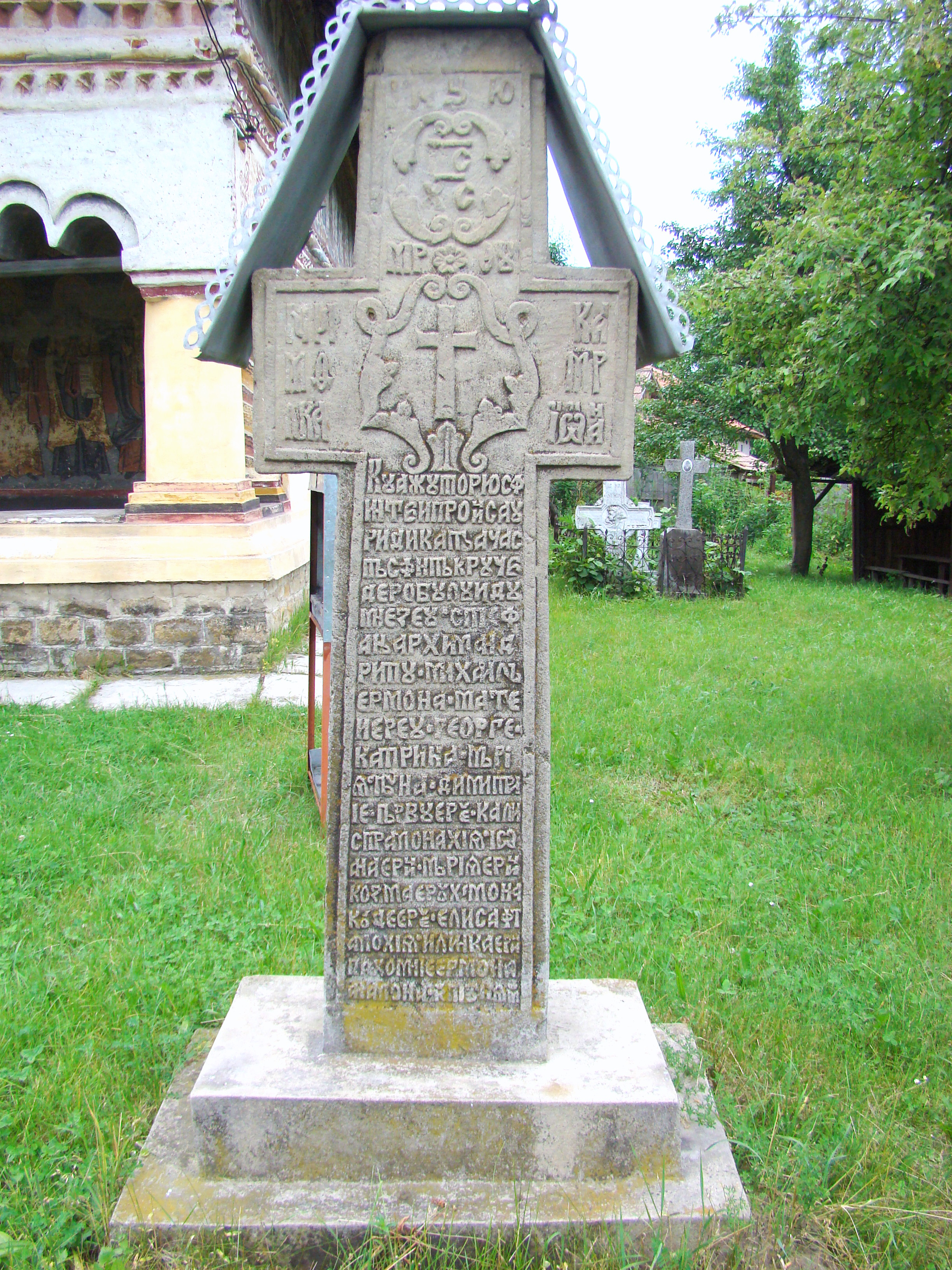 Biserica monument „Sf.Trei Ierarhi” din Genuneni, Vâlcea